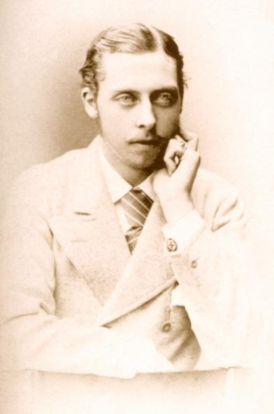 Photographie de Leopold Duc d'Albany